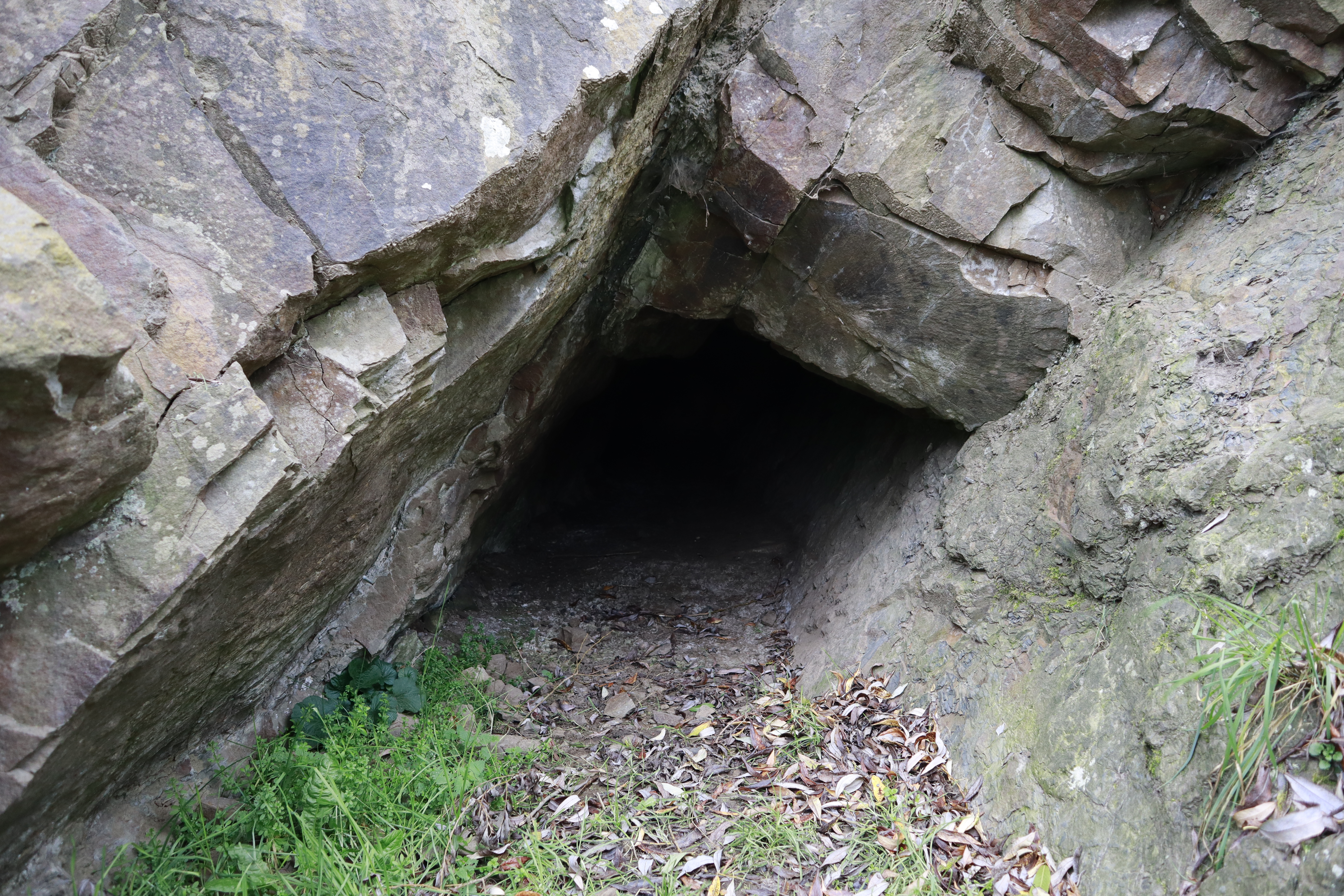 Hundisburg, Stollen Räuberhöhle